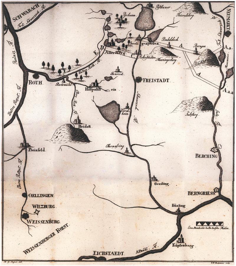 Karte eines Kanalprojekts zur Verbindung von Main und Donau aus dem Buch Einige Fingerzeige zur Beförderung des großen Projektes die Donau mit dem Rheine zu vereinigen. von Michael Georg Regnet, Nürnberg, 1801.